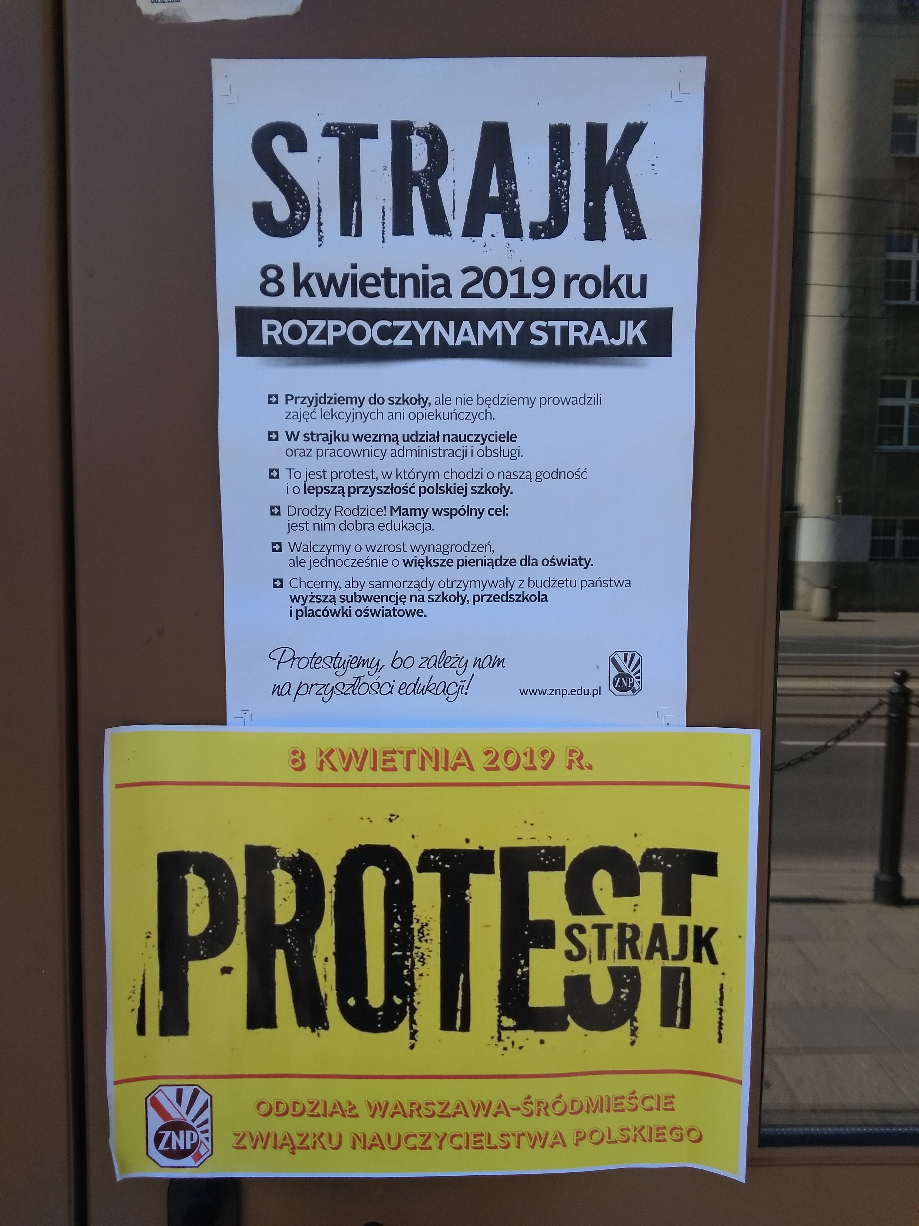 Ogólnopolski strajk nauczycieli, zespół szkół przy ulicy Stawki 10 w Warszawie.